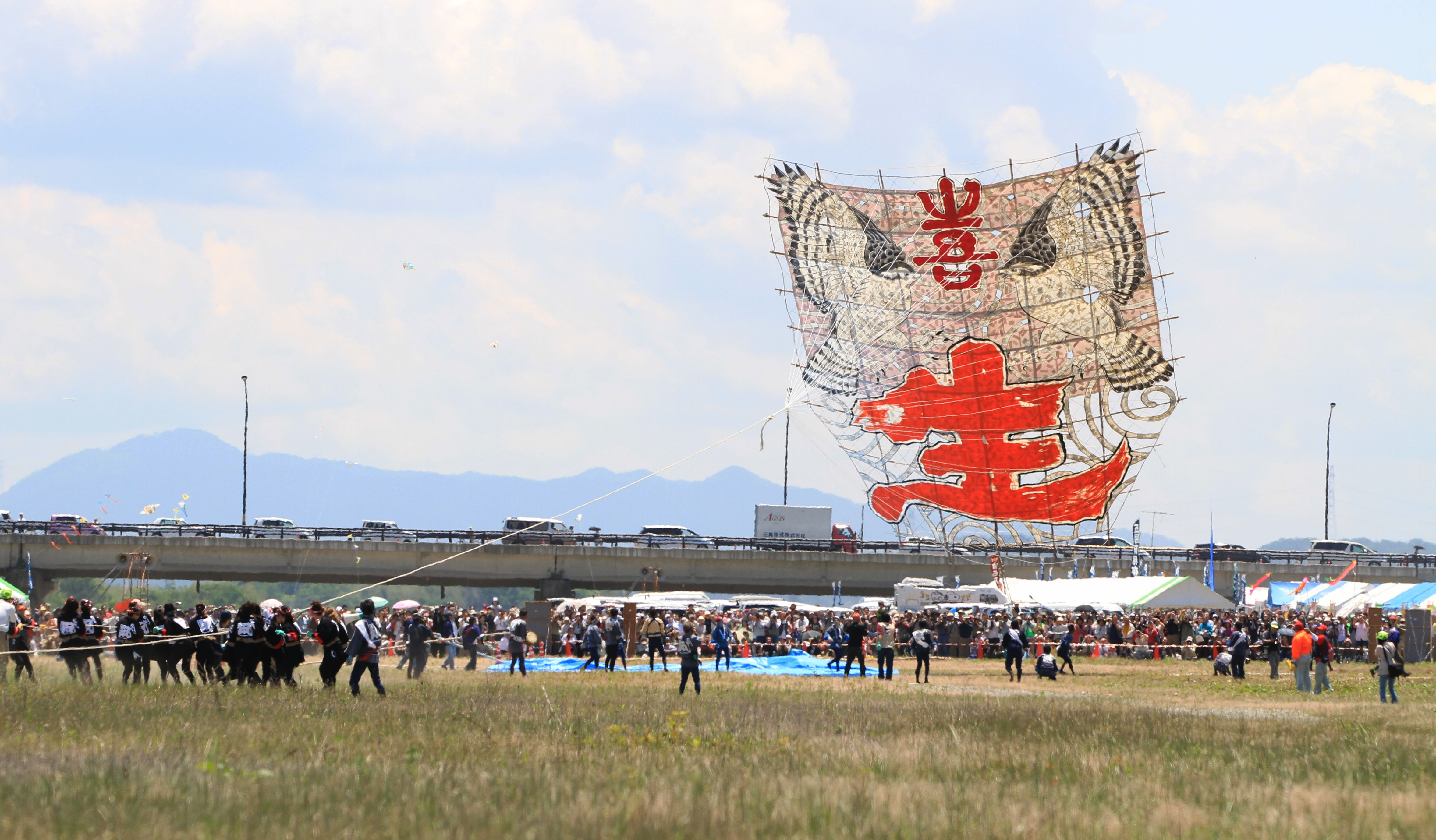 愛知川河川敷